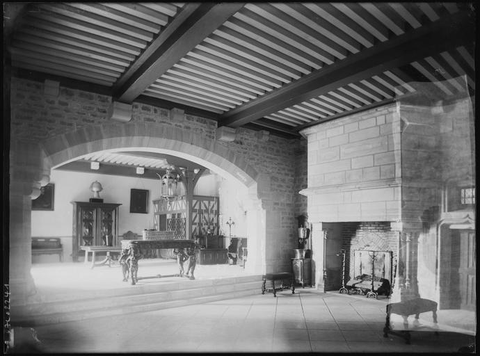 Burg La Rochepot in Burgund, Saal der Wachen